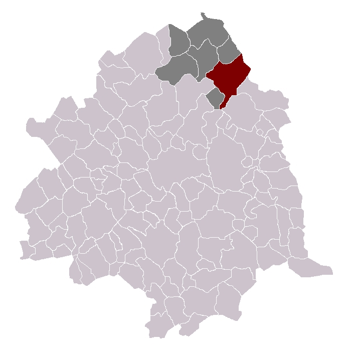 Les cantons de Tourcoing